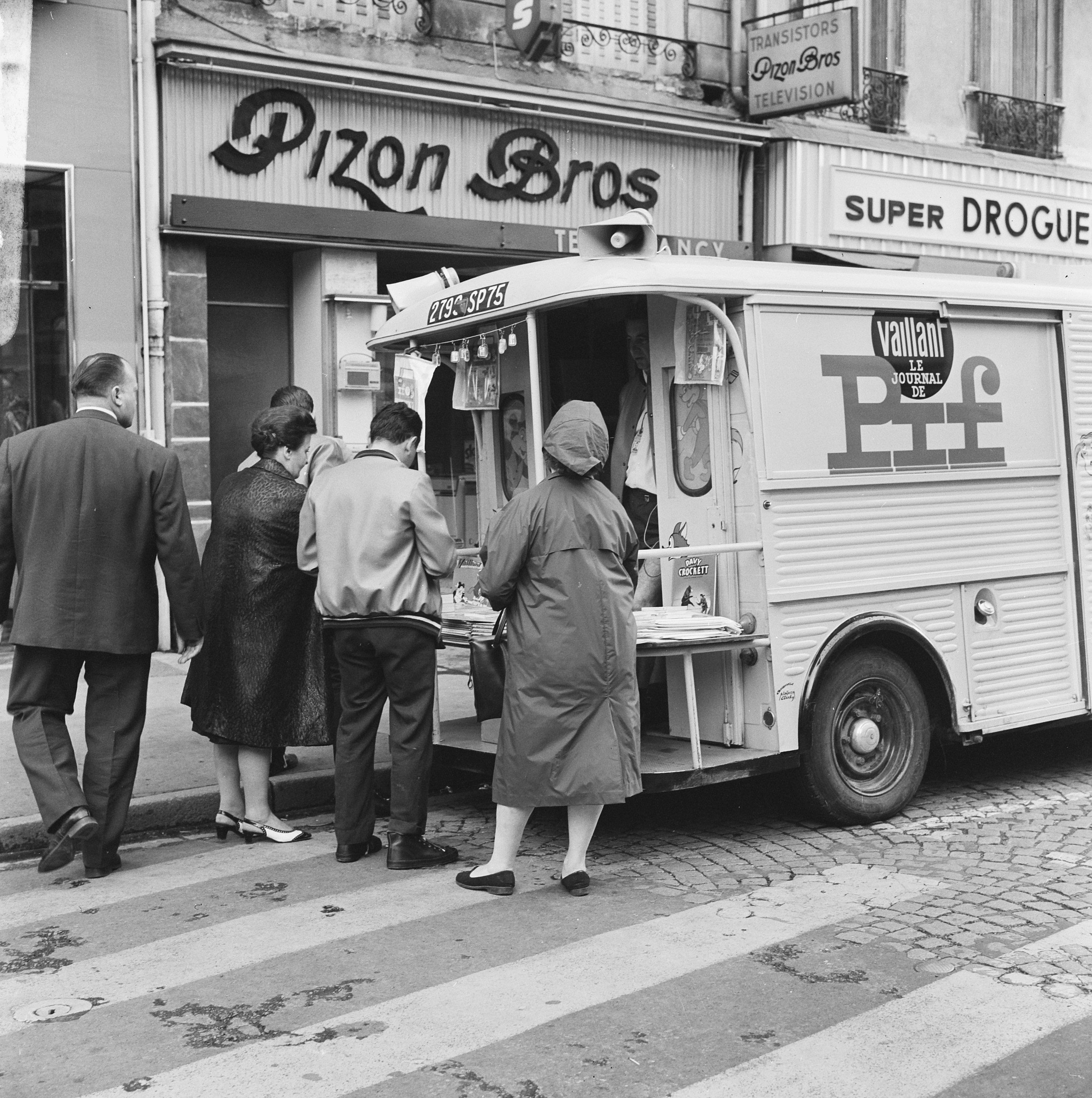 Collectie / Archief : Fotocollectie Anefo Reportage / Serie : [ onbekend ] Beschrijving : Tour de France , Nancy, straatverkoop Datum : 27 juni 1966 Trefwoorden : straatverkopers, wielrennen Instellingsnaam : Tour de France Fotograaf : Koch, Eric / Anefo Auteursrechthebbende : Nationaal Archief Materiaalsoort : Negatief (zwart/wit) Nummer archiefinventaris : bekijk toegang 2.24.01.03 Bestanddeelnummer : 919-2968